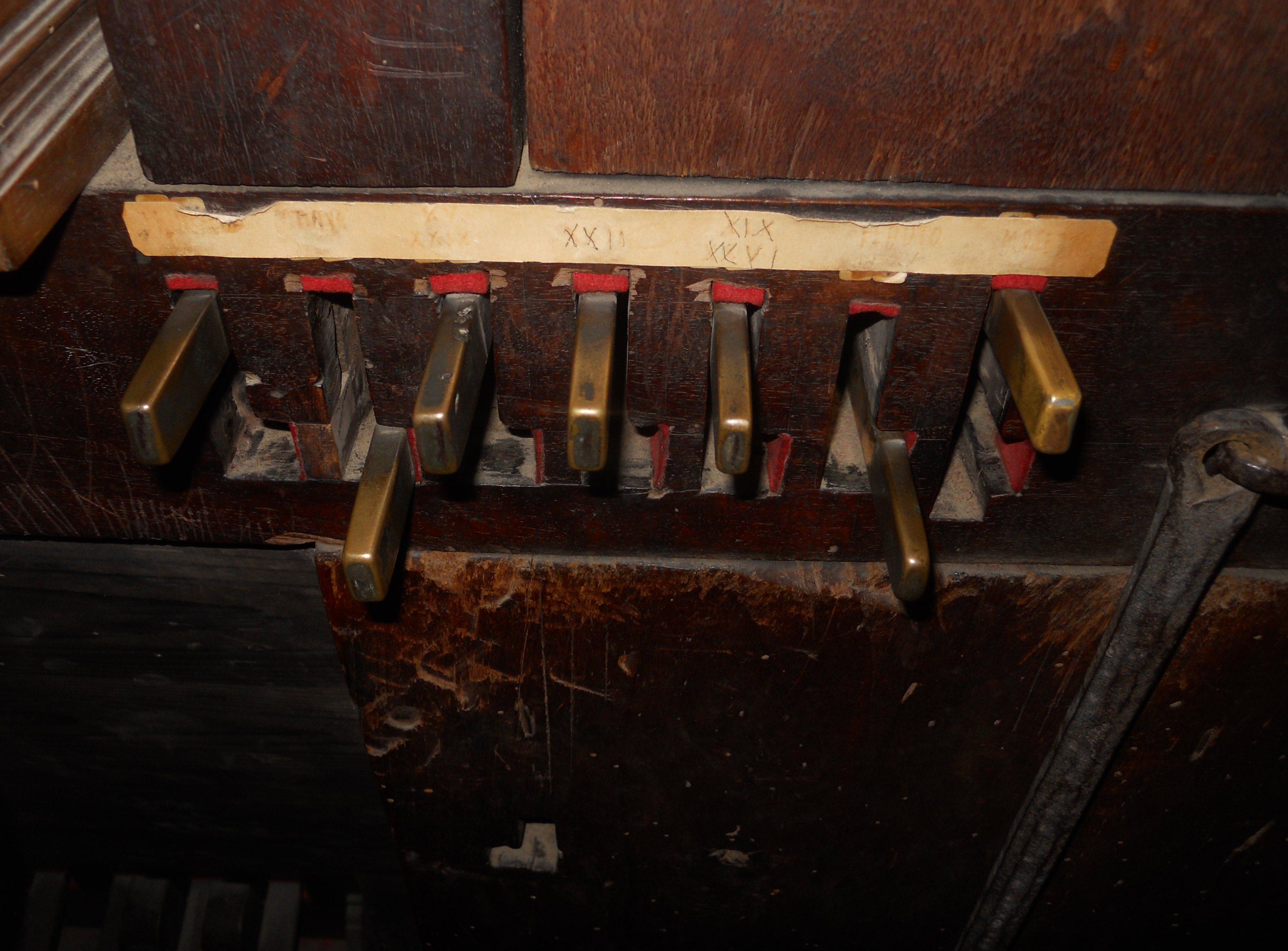 Comandi dei registri dell'organo a canne della chiesa della Santissima Annunziata in Siena, costruito da Giovanni Piffero nel 1514-1518